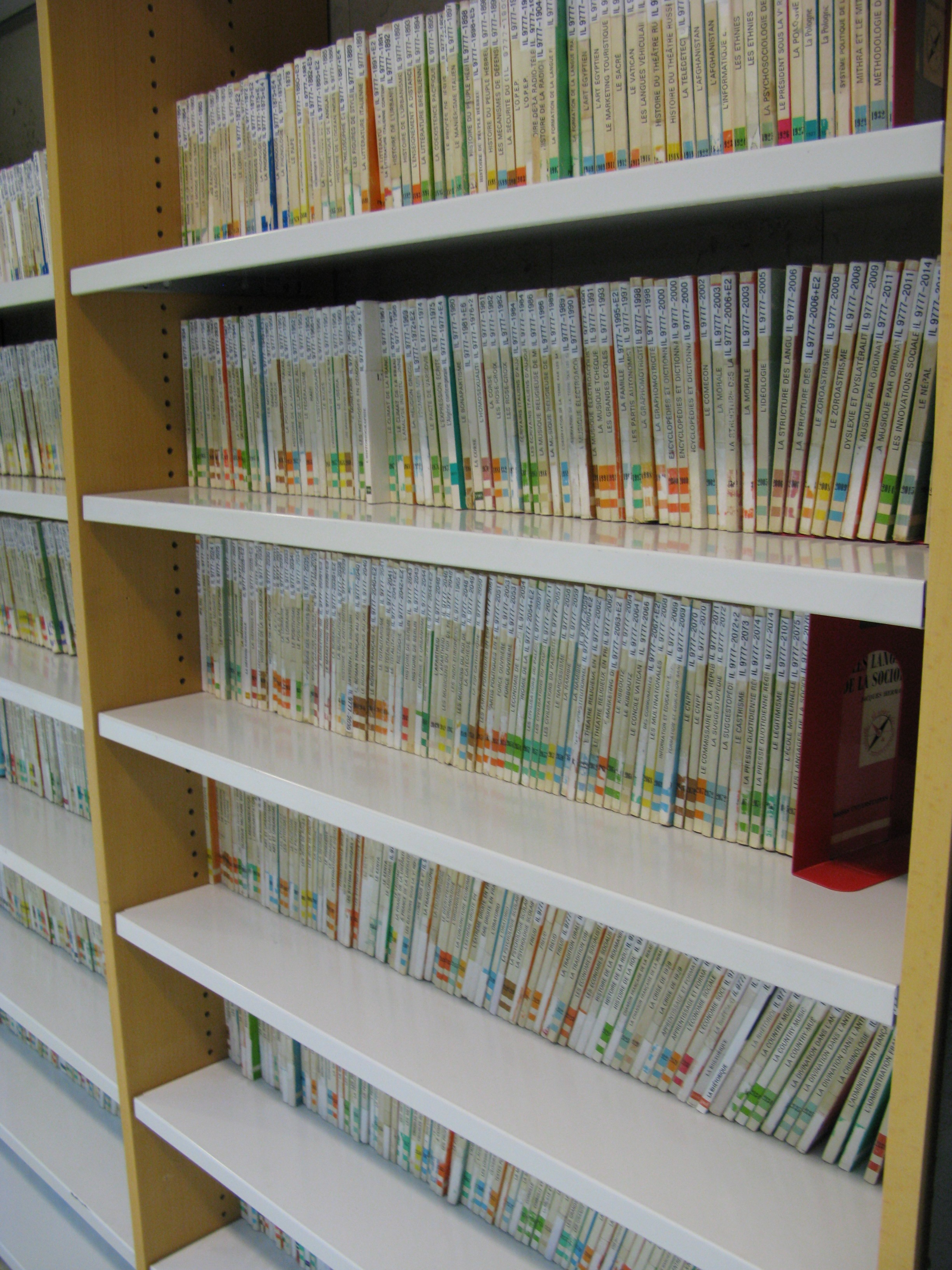 Ouvrages de la série Que sais-je dans une bibliothèque